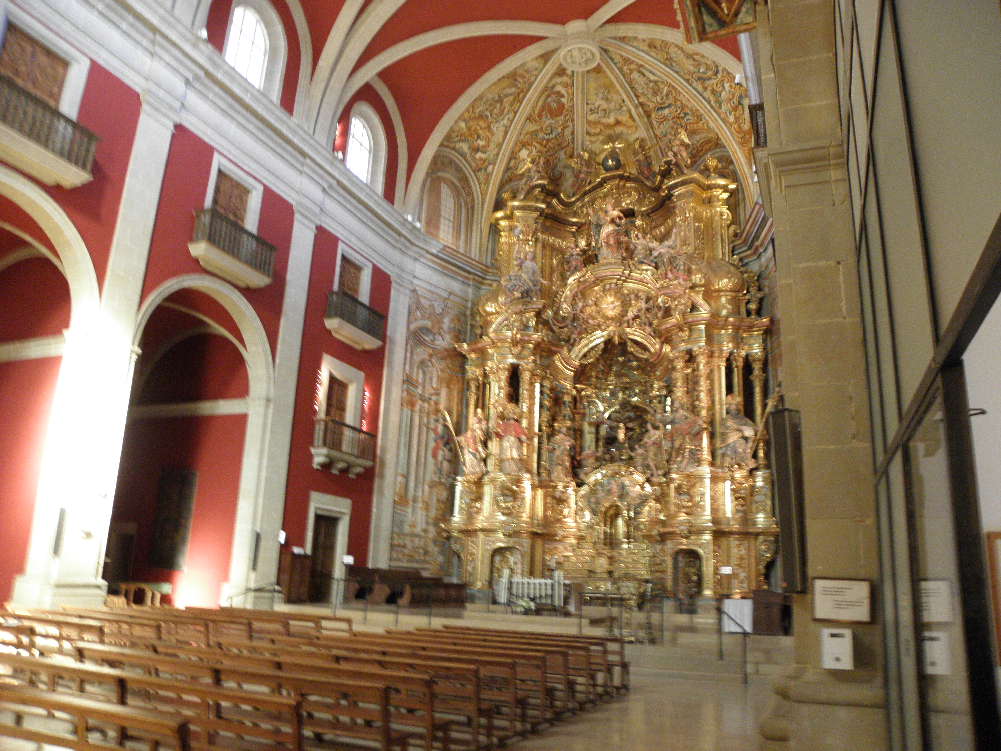 Interior de l'església del Santuari del Miracle (Riner, Solsonès).